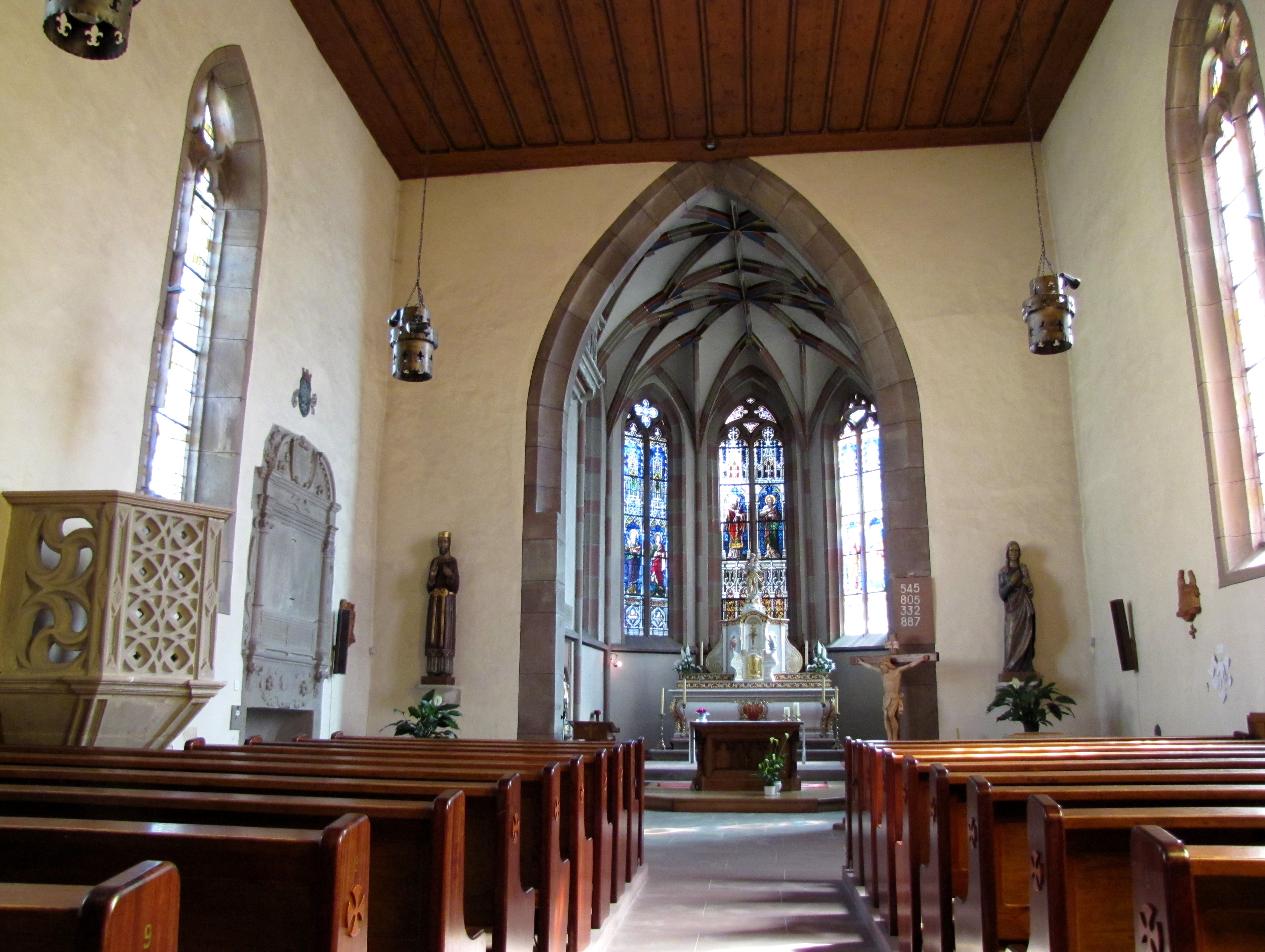 Alsace, Bas-Rhin, Sarrewerden, Église Saint-Barthélemy (ancienne Collégiale Saint-Blaise) (PA00084945, IA67005982): Vue intérieure de la nef vers le choeur. Chaire à prêcher (1586)